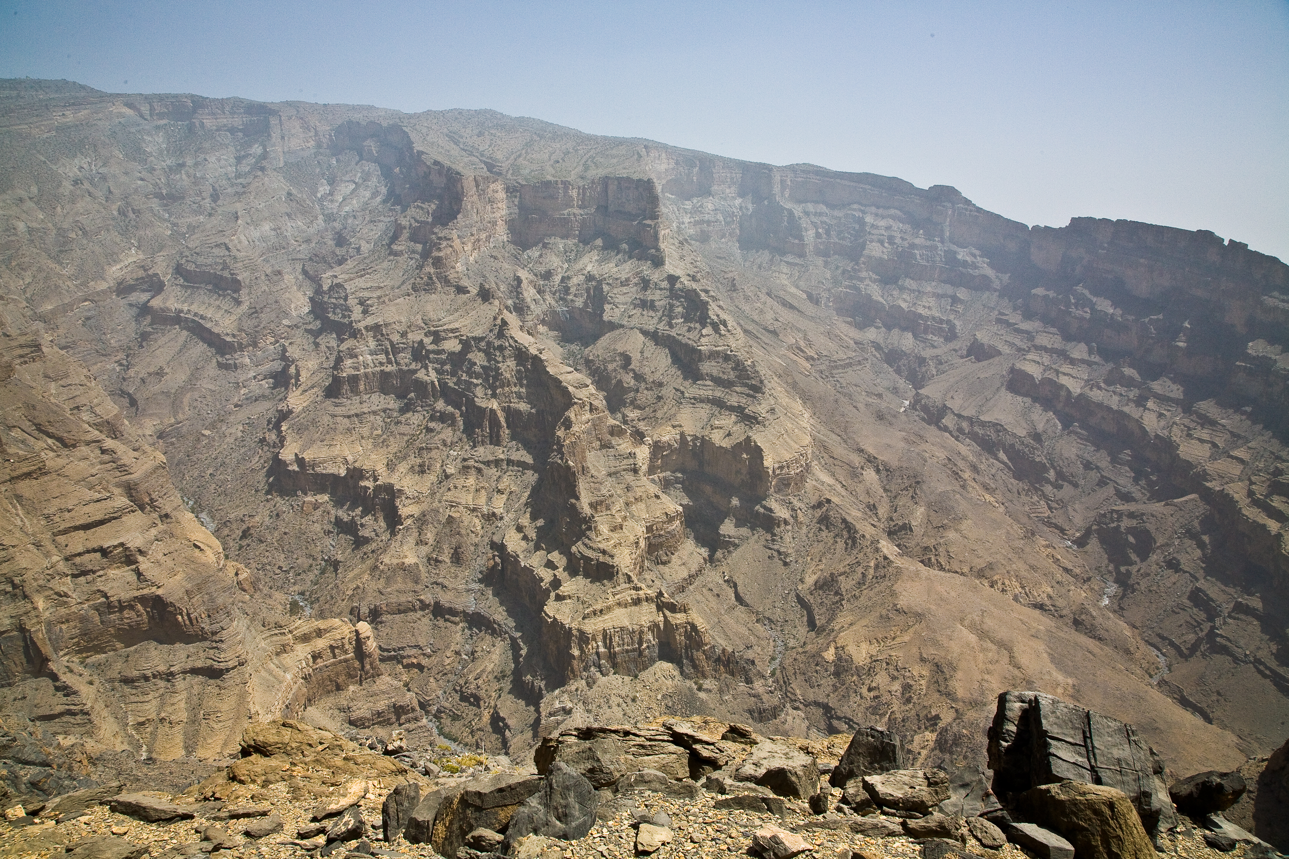 Jebel Shams